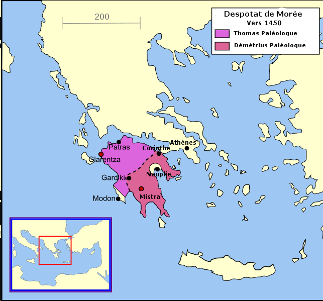 Carte du despotat de Morée et de sa division entre les deux co-despotes vers 1450.